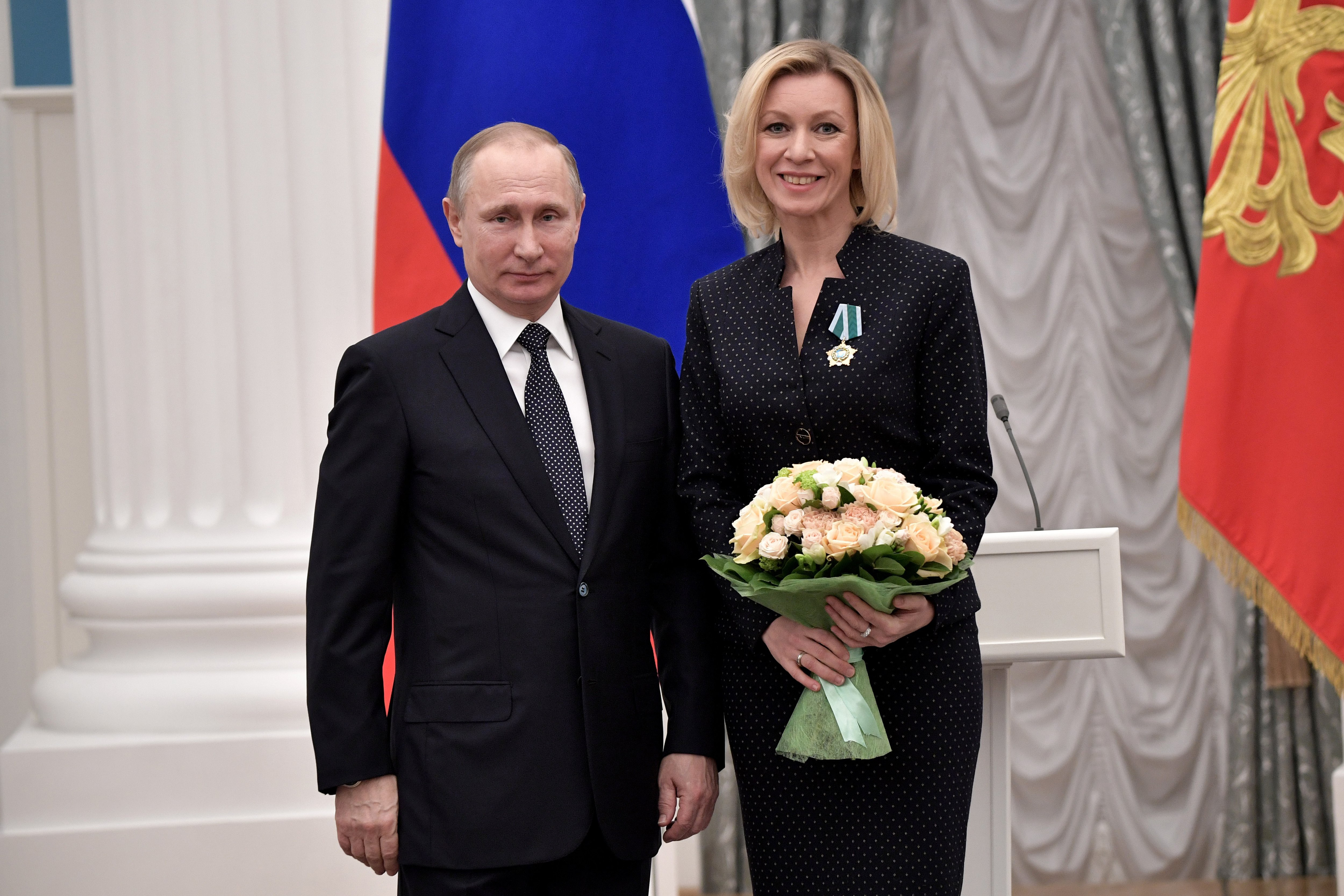 Церемония вручения государственных наград в Екатерининском зале Кремля. Награждение Марии Захаровой Орденом Дружбы